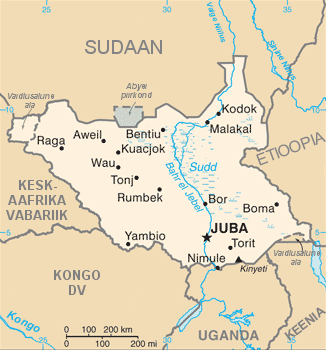 Lõuna-Sudaani kaart